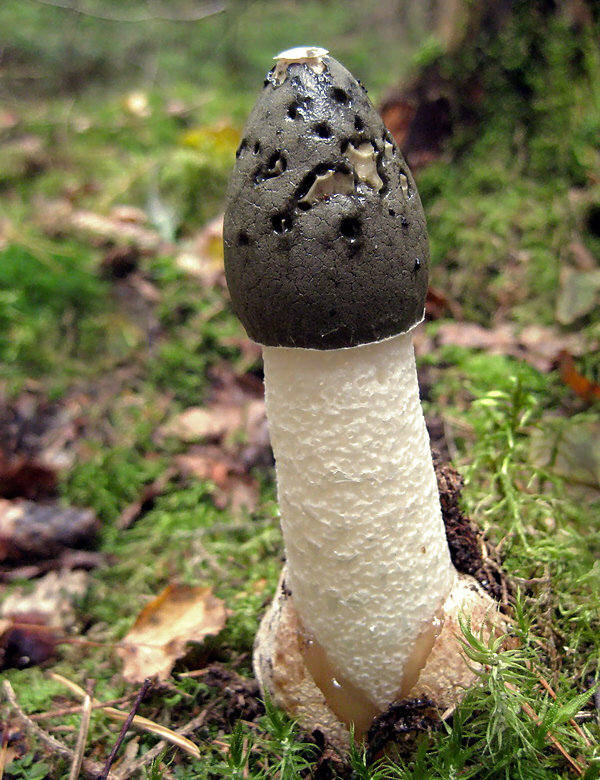 Гриб Веселка. Минский р-н